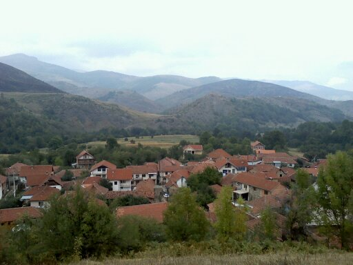 Pogled na jedan deo sela Licensing